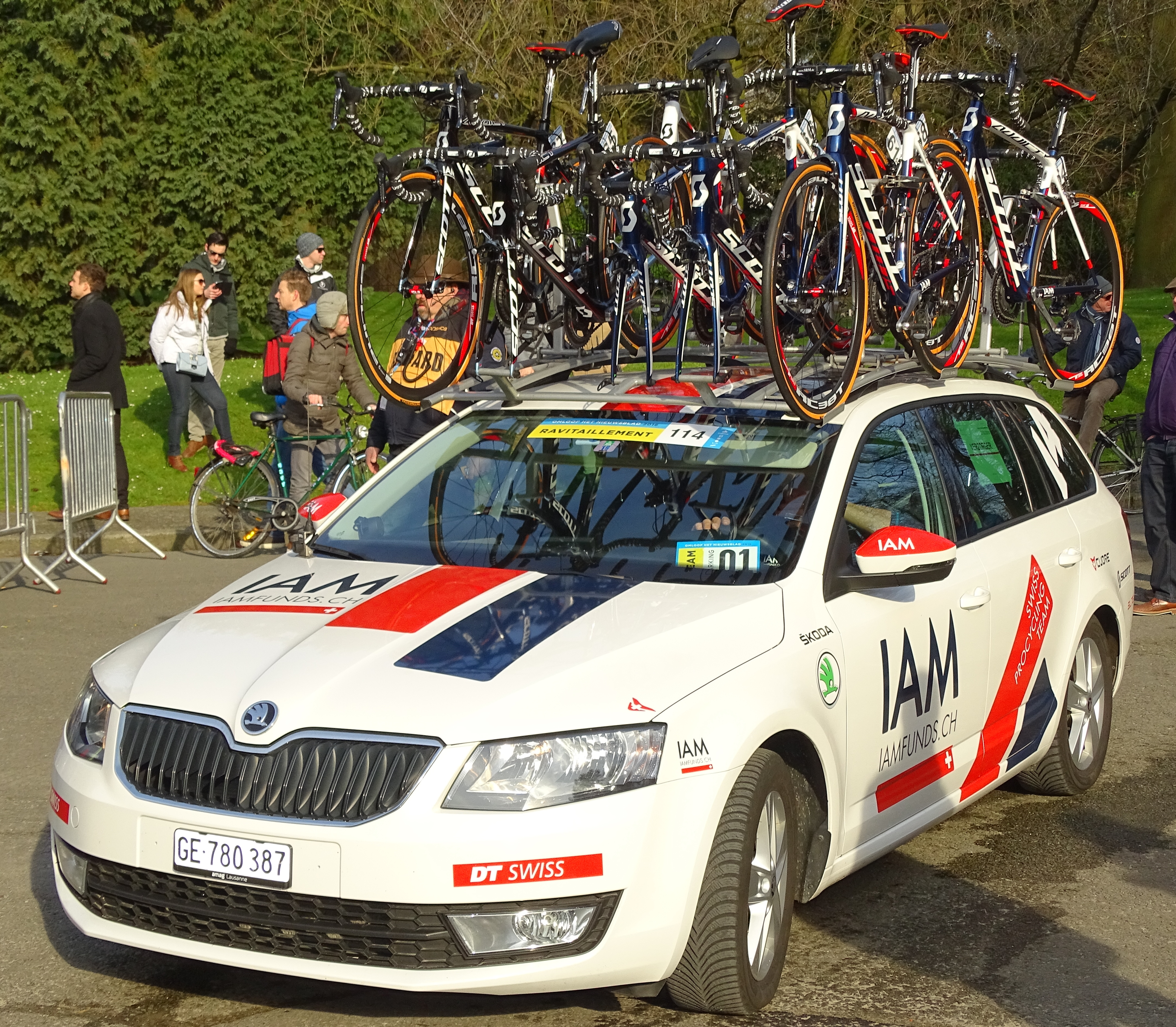 Reportage réalisé le samedi 27 février à l'occasion du départ et de l'arrivée du Circuit Het Nieuwsblad 2016 et de l'arrivée du Circuit Het Nieuwsblad féminin 2016 à Gand, Belgique.